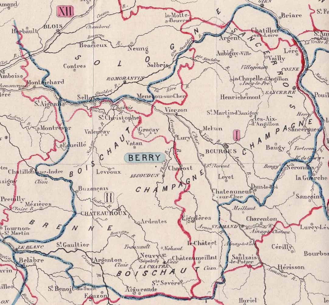 Carte de l'ancienne province de Berry (France). Extrait du Glossaire du Centre de la France, de Jaubert (1864). (en rouge : limite des actuels départements : Cher, Indre, Loiret, Nièvre, Allier, Creuse, Vienne, Indre-et-Loire, Loir-et-Cher ; en bleu : limite de l'ancienne province de Berry) Licensing Catégorie:Carte de France